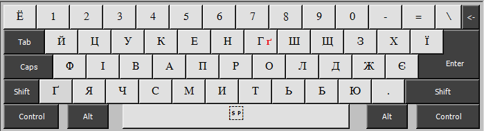 Типова українська розкладка в WinXP та попередніх версіях Windows